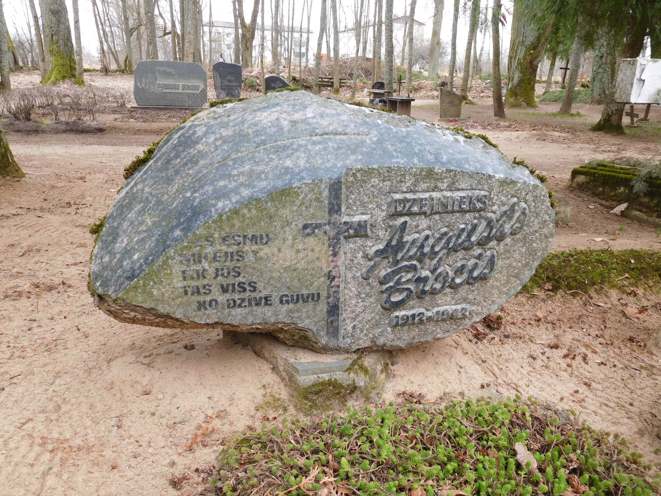 Dzejnieks Augusts Brocis. Piemineklis Viļķenes pagasta Katrīnas kapos.